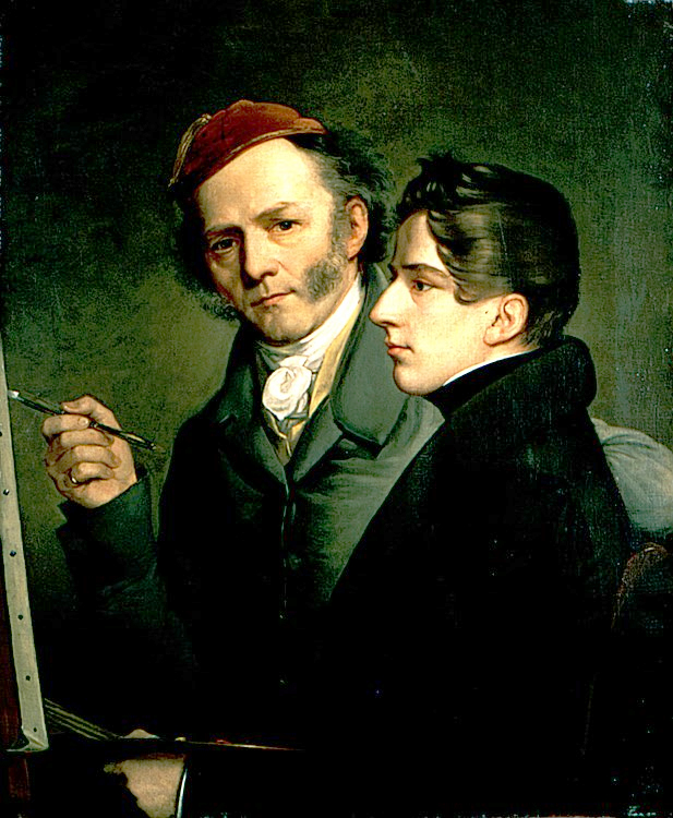 Selbstbildnisse von David Sulzer und seinem Sohn Julius Karl Emil Sulzer, gemalt von den jeweils Dargestellten